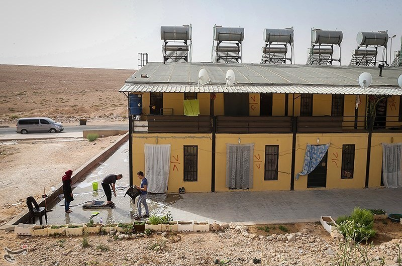 شهرک حسیاء